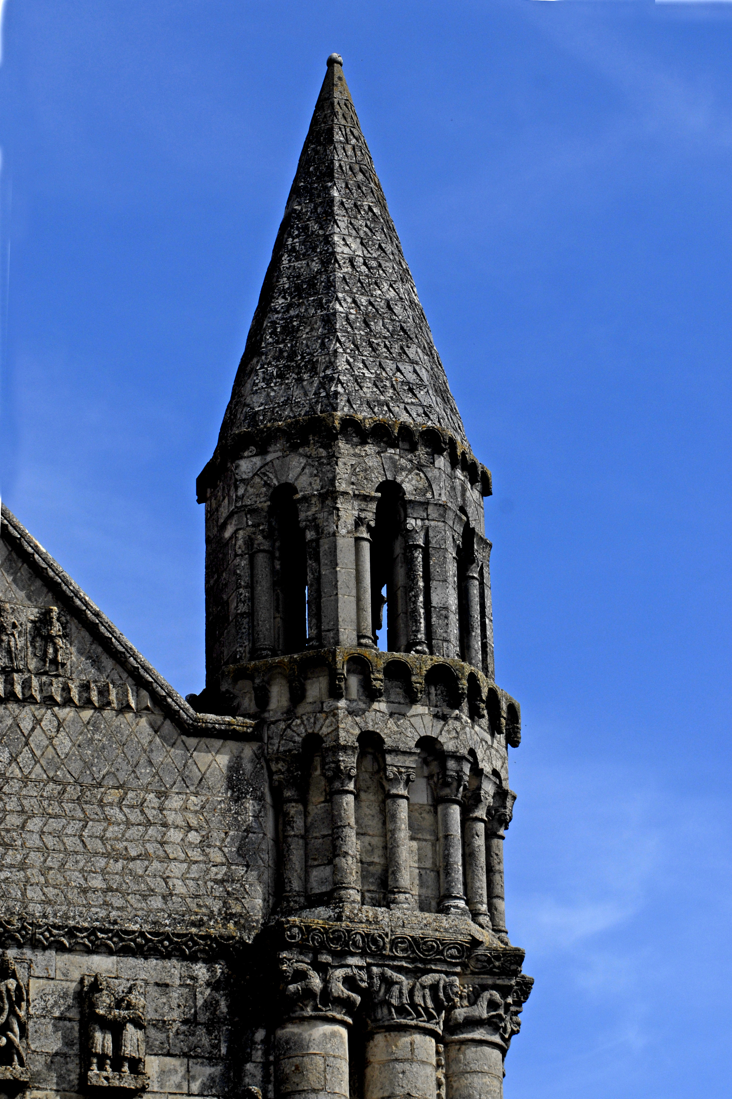 Saint-Jouin-de-Marnes, südliches Fassadentürmchen